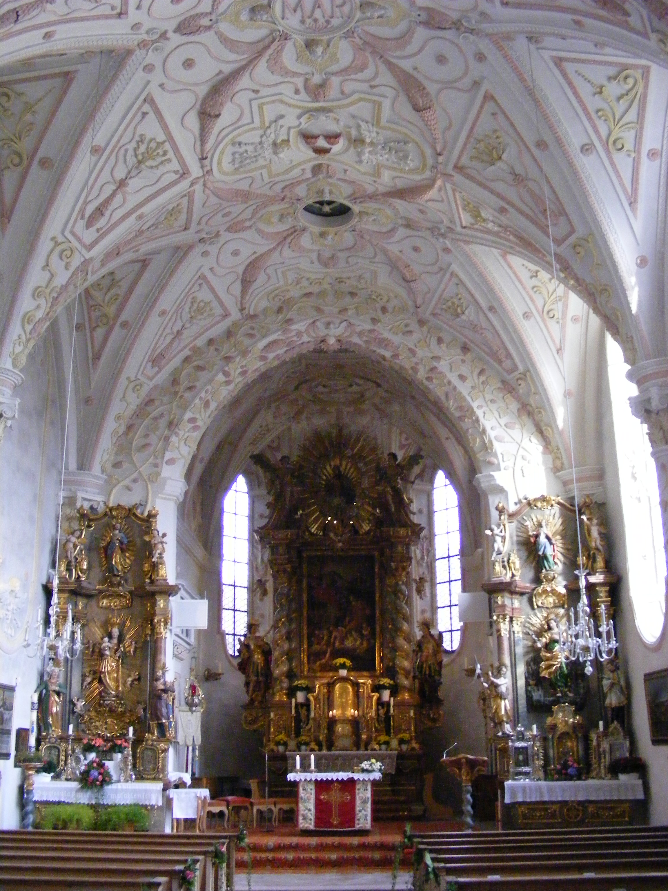 Interieur des kath. Kirchengebäudes St. Laurentius in Rottach-Egern, OT Egern, Landkreis Miesbach, Bayern.